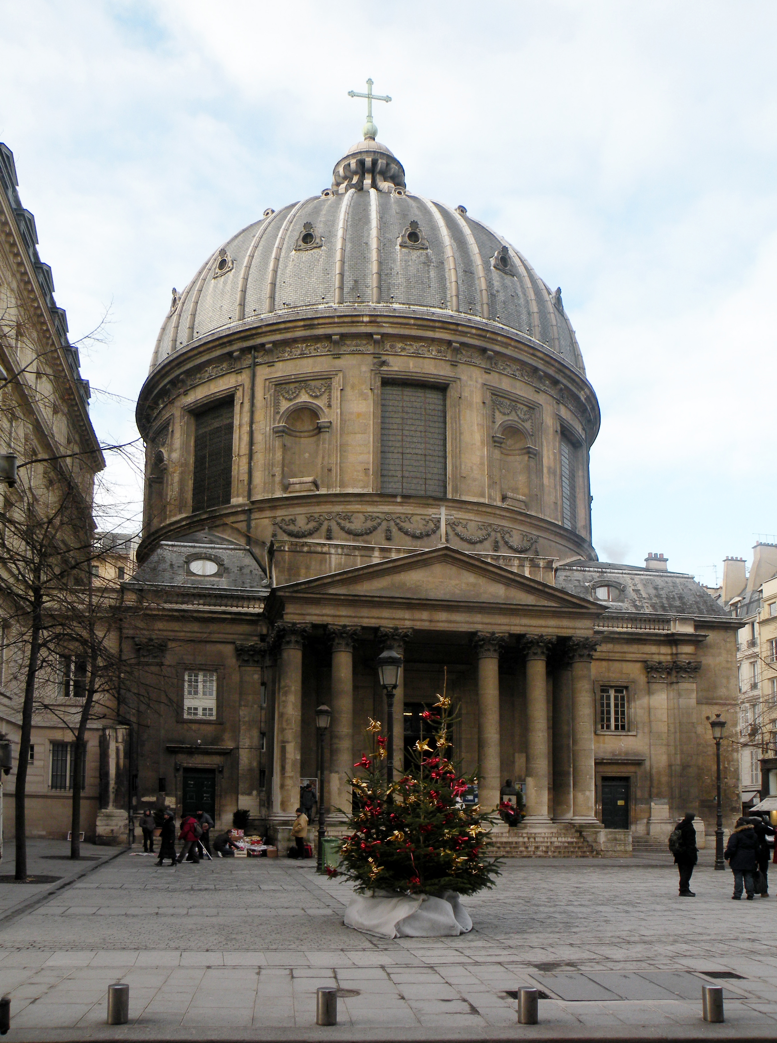 Церковь Успения Богородицы